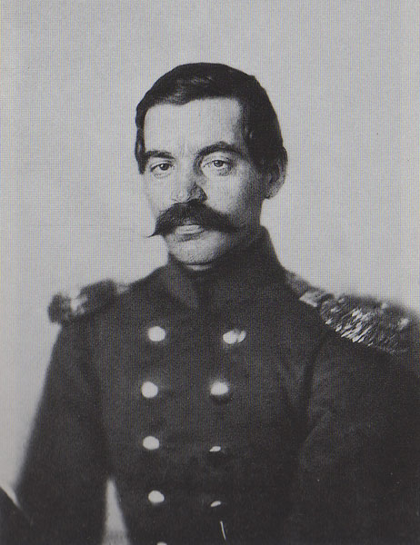 Милован Јанковић, економиста (1828-1899)